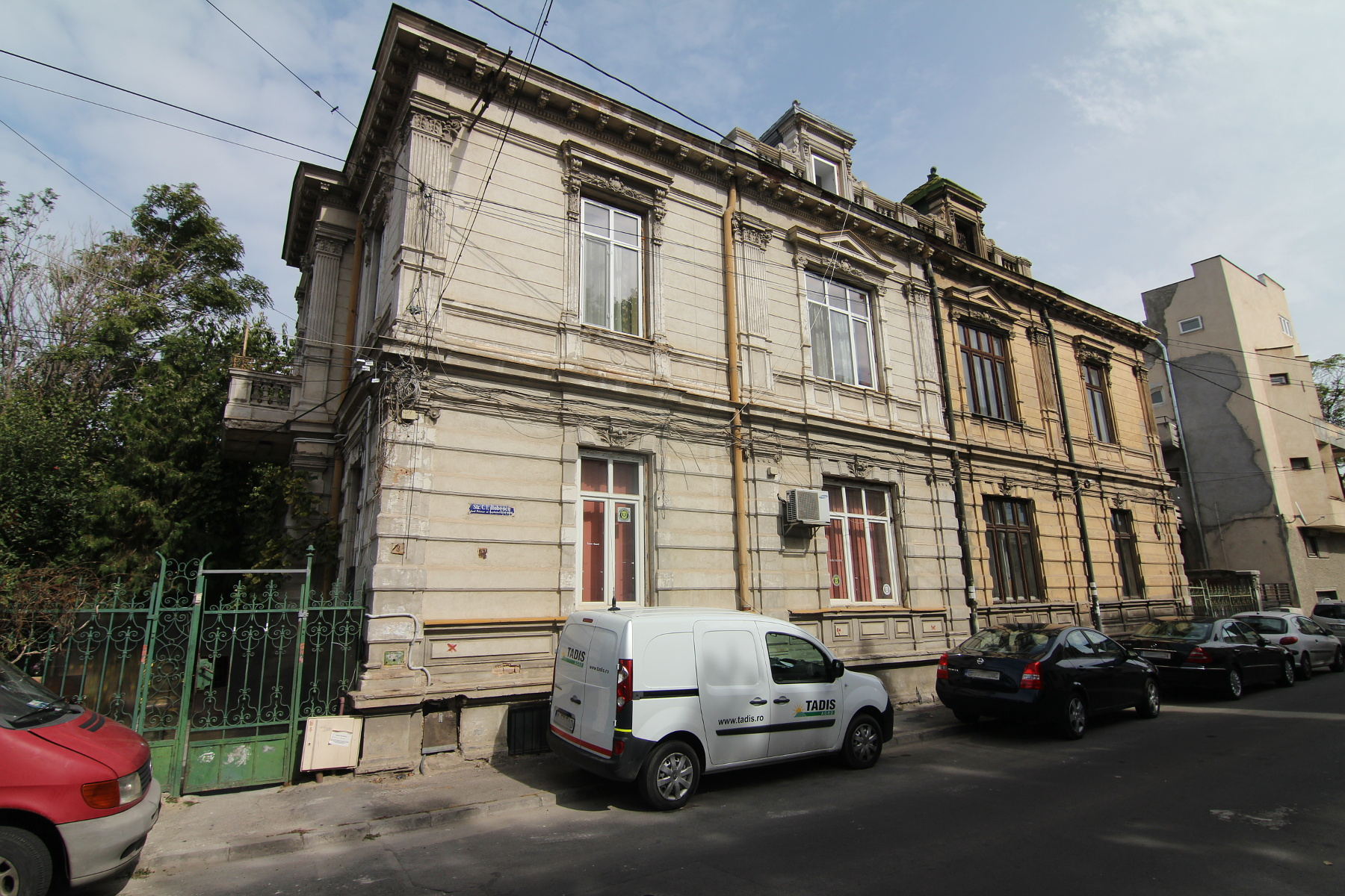 Casă pe Str Robescu